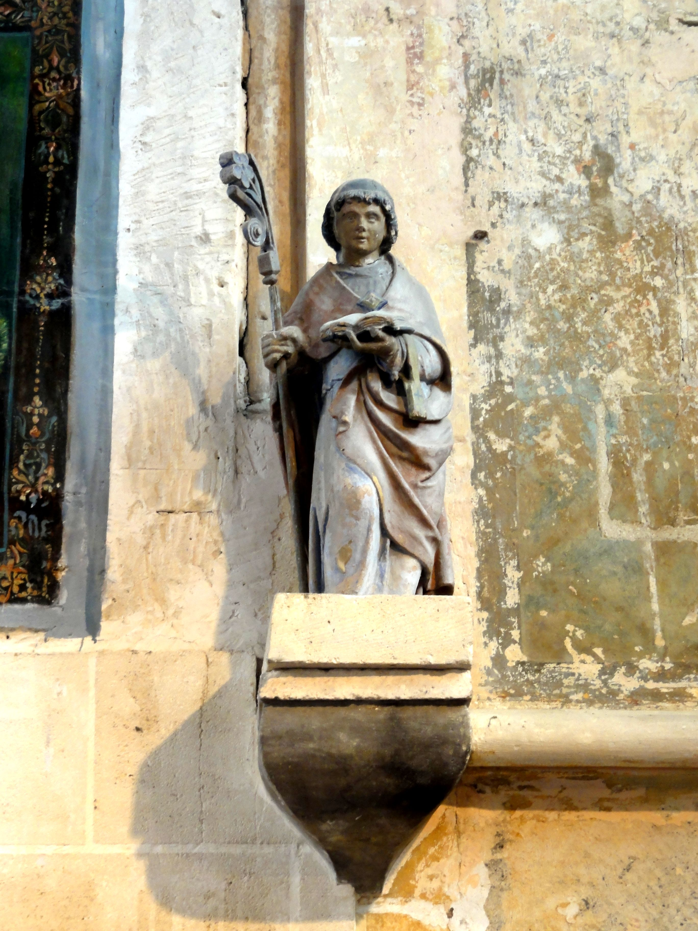 Statue de saint Benoît.